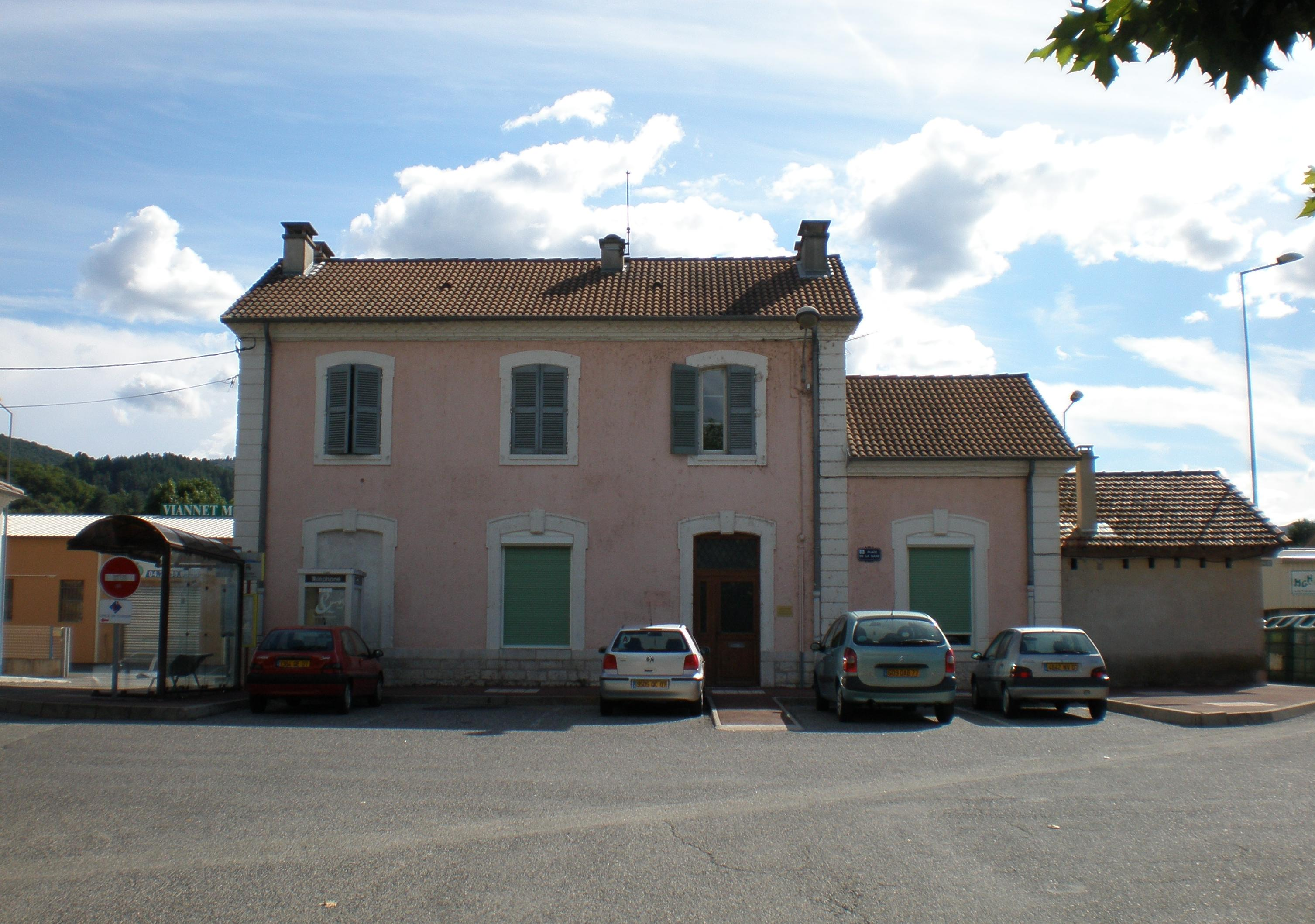 L'ancienne gare de Lalevade d'Ardèche (aujourd'hui bâtiment communal)